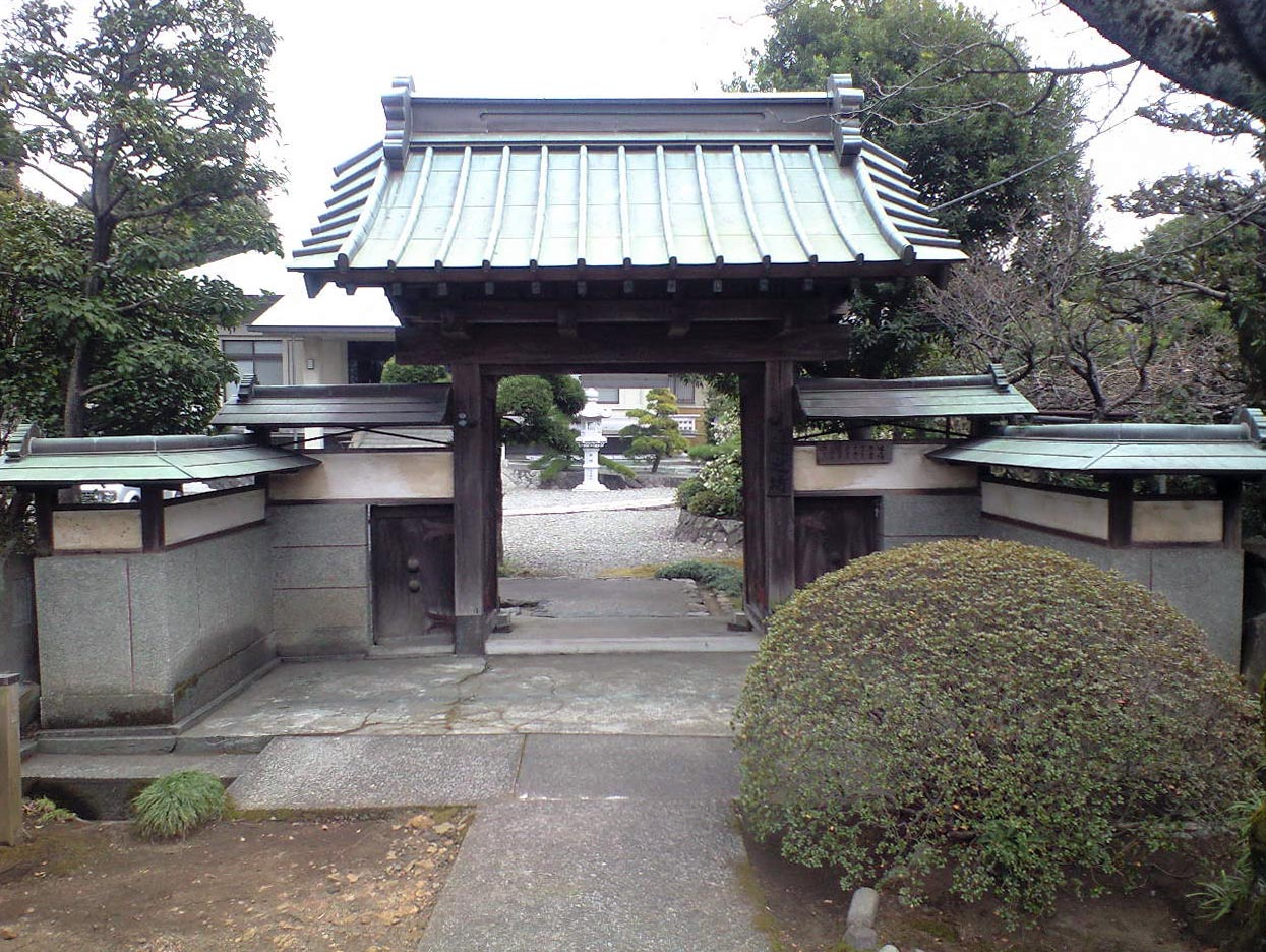 静岡県沼津市岡宮、光長寺辻之坊山門（1777年（安永6年）？）、元沼津城中庭門？